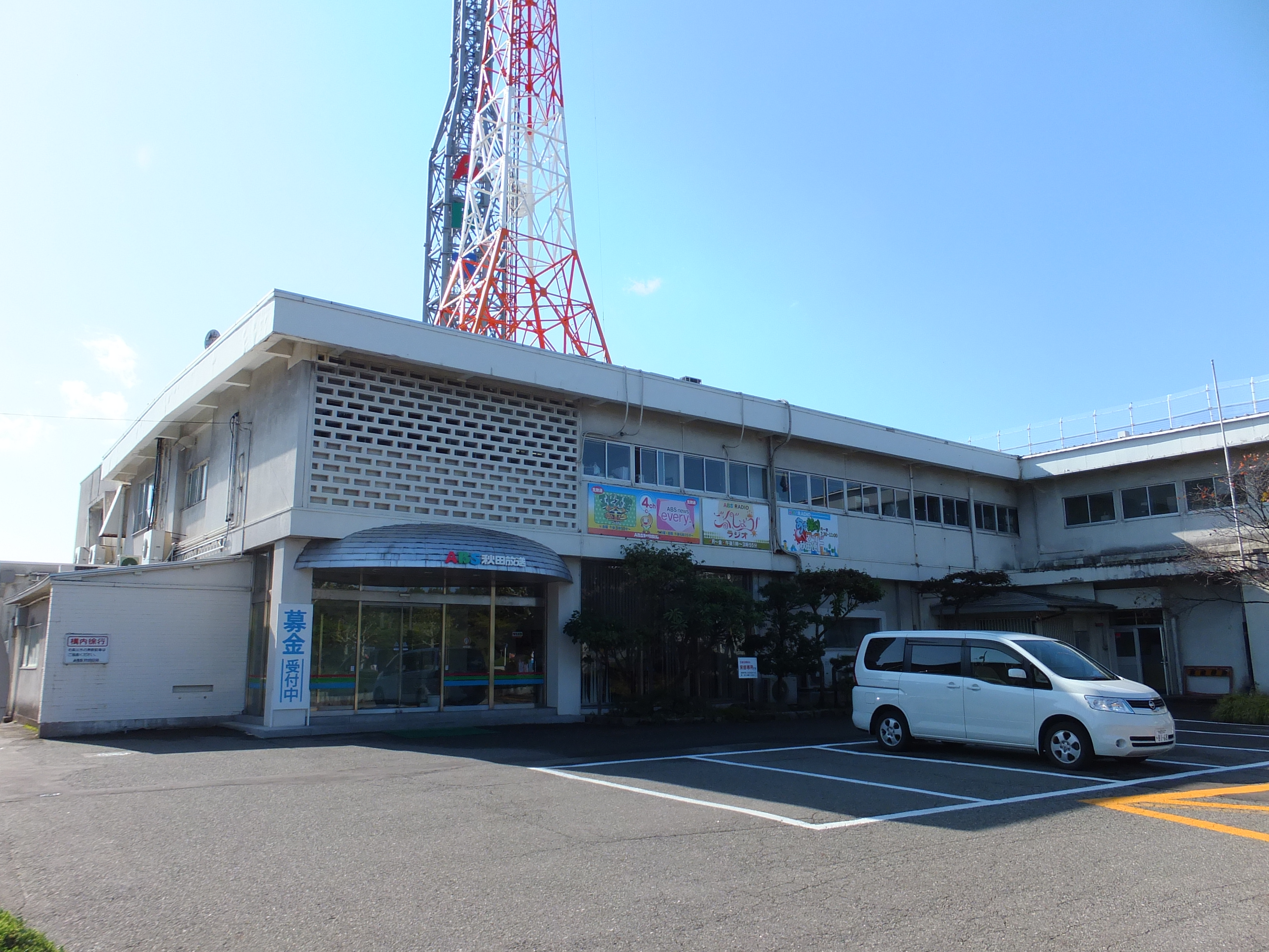 秋田放送（ABS）本社 （秋田市山王）